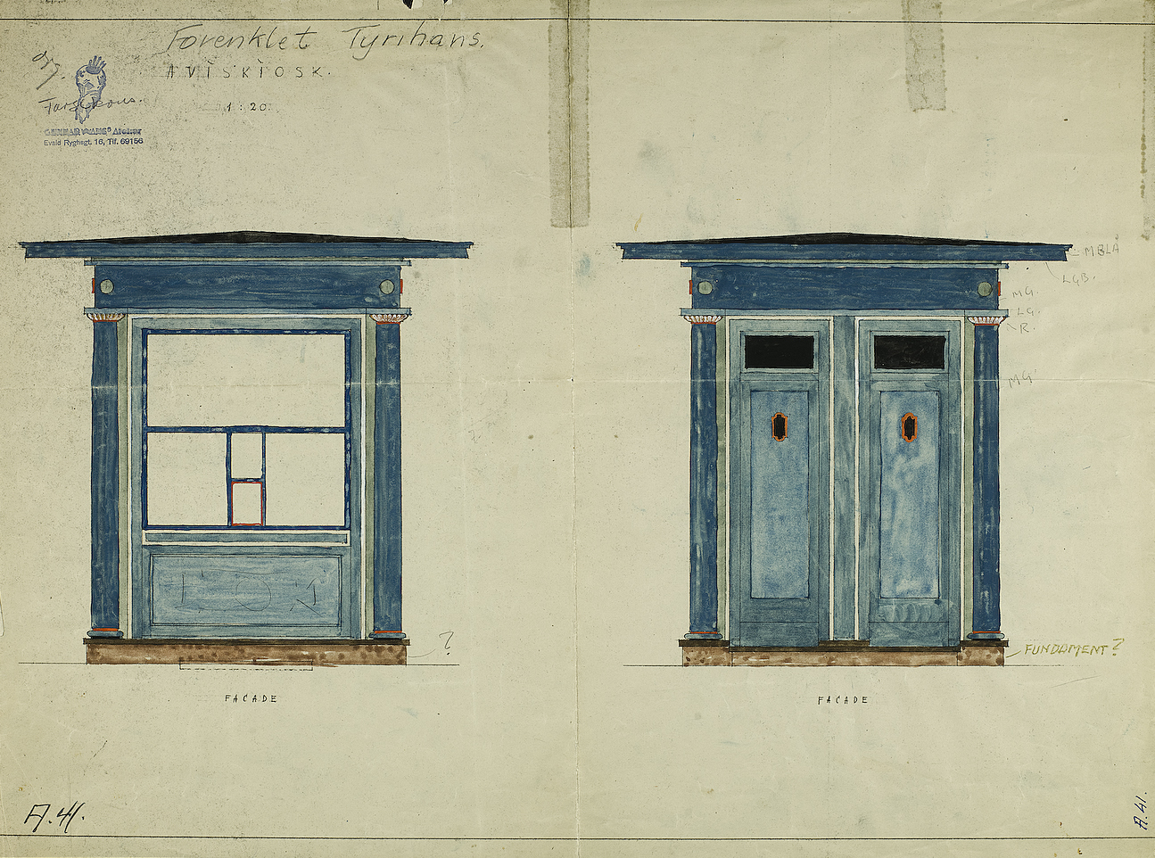 Månedens dokument for mars 2010 er hentet fra arkivet etter Narvesen kioskkompani. Det er en tegning av kiosken Tyrihans som vant en arkitektkonkurranse i 1923. Arkivreferanse: Riksarkivet, PA-1522 Narvesen. Arkitektkonkurranser, Ta _01_01 Url